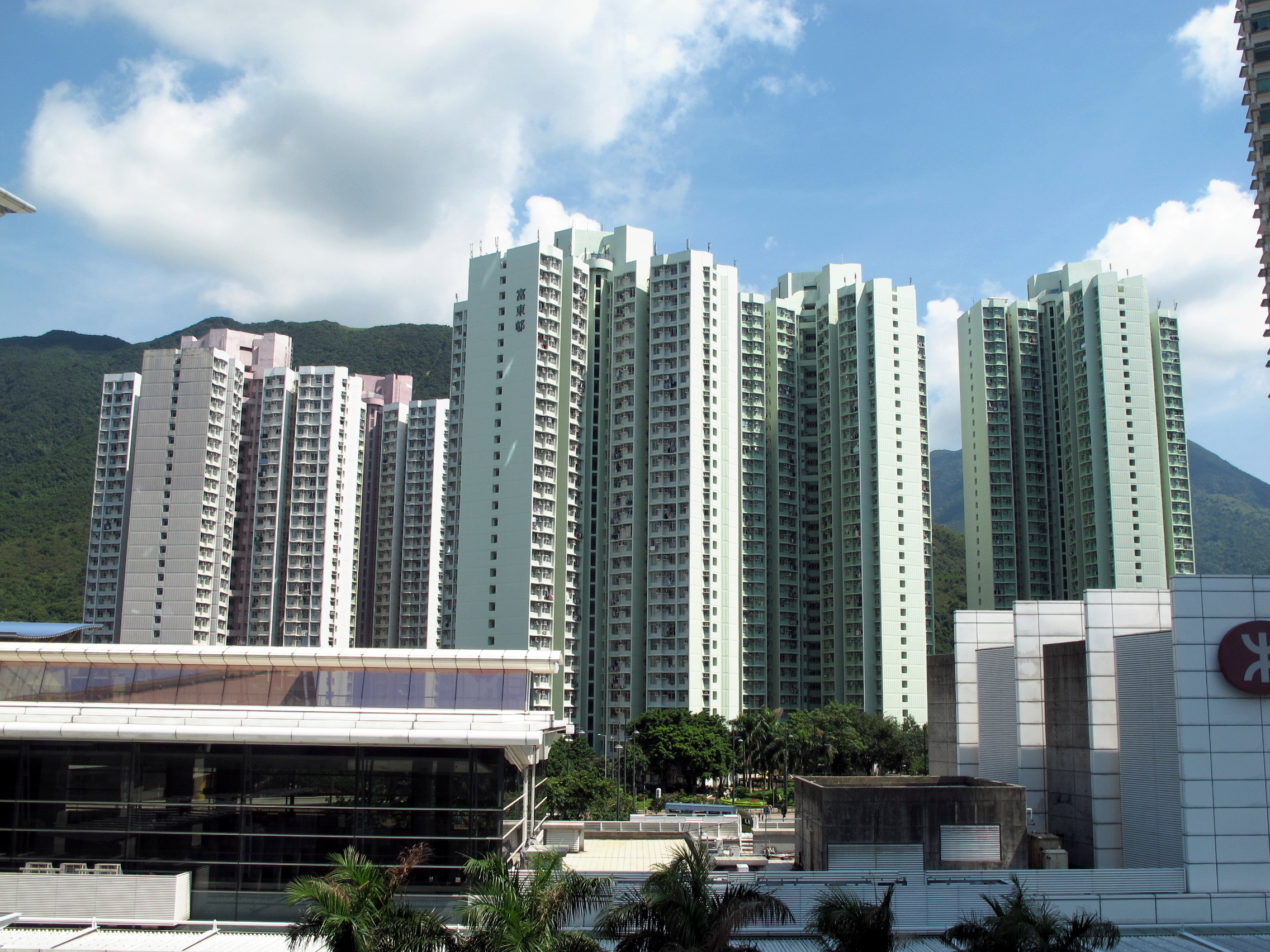 Fu Tung Estate 富東邨